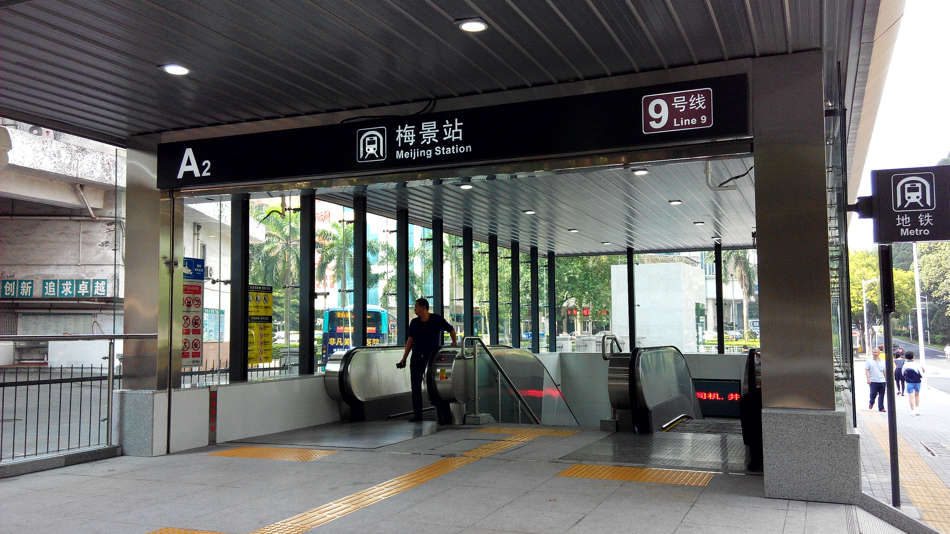 深圳地铁9号线 梅景站 A2出口